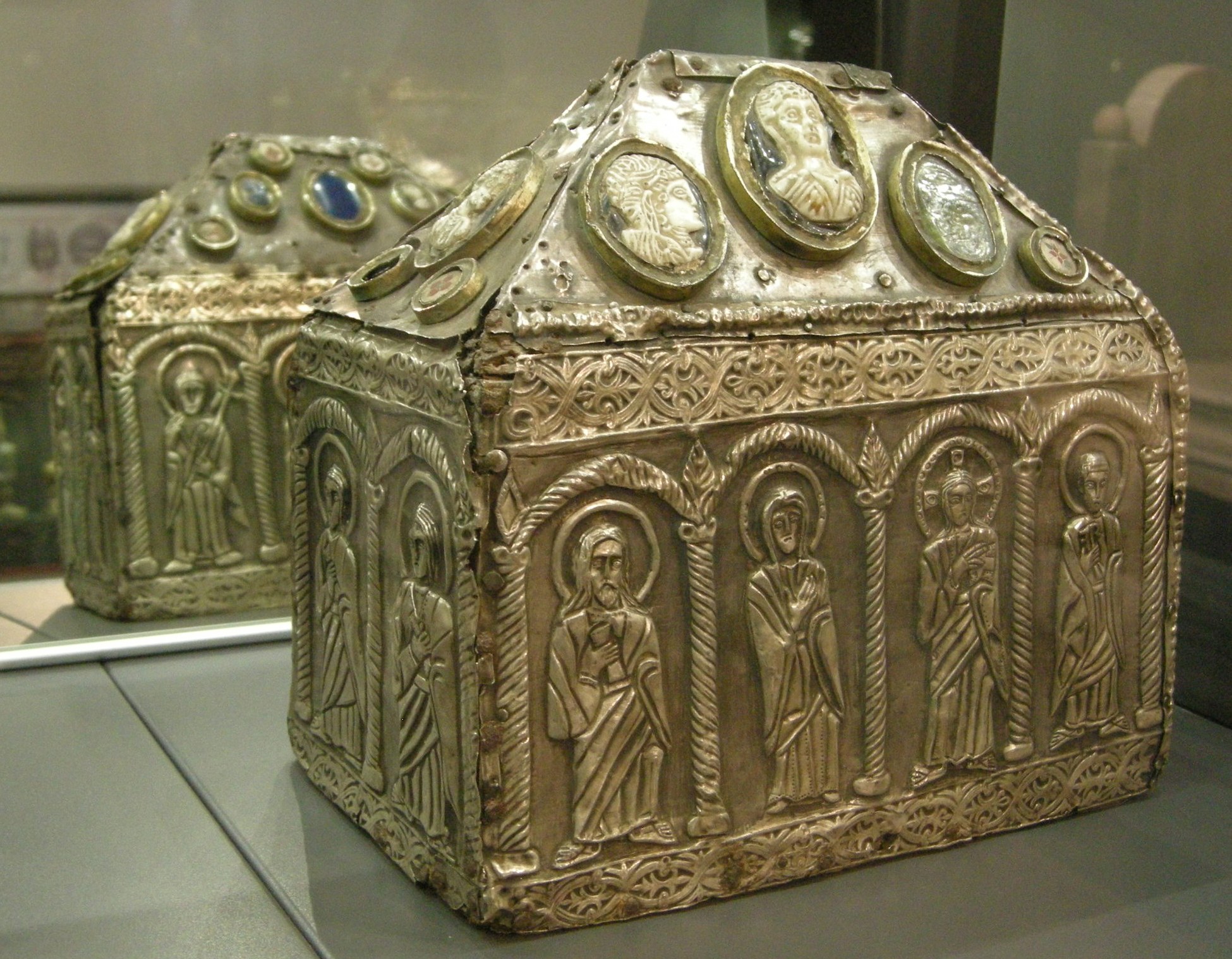 Cividale, museo cristiano, capsella per reliquie, lamina d'argento sbalzata, fine IX-inizio X secolo